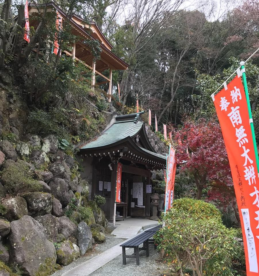 妙圓寺岩谷霊穴